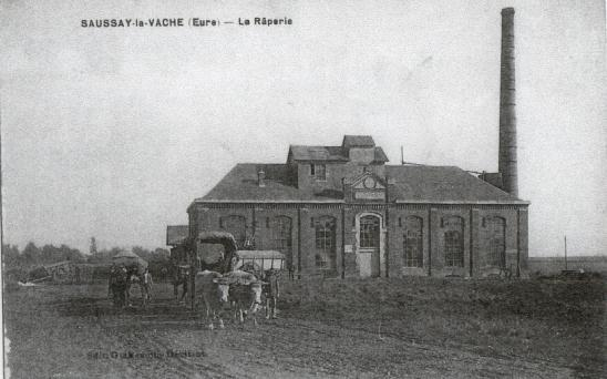 Façade de la râperie en 1910